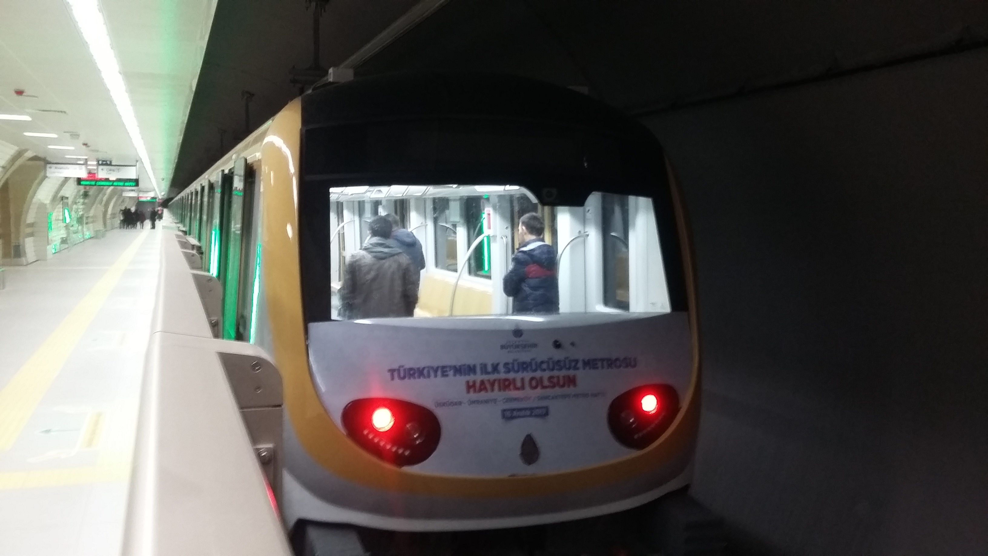 M5 Kısıklı Metro İstasyonu